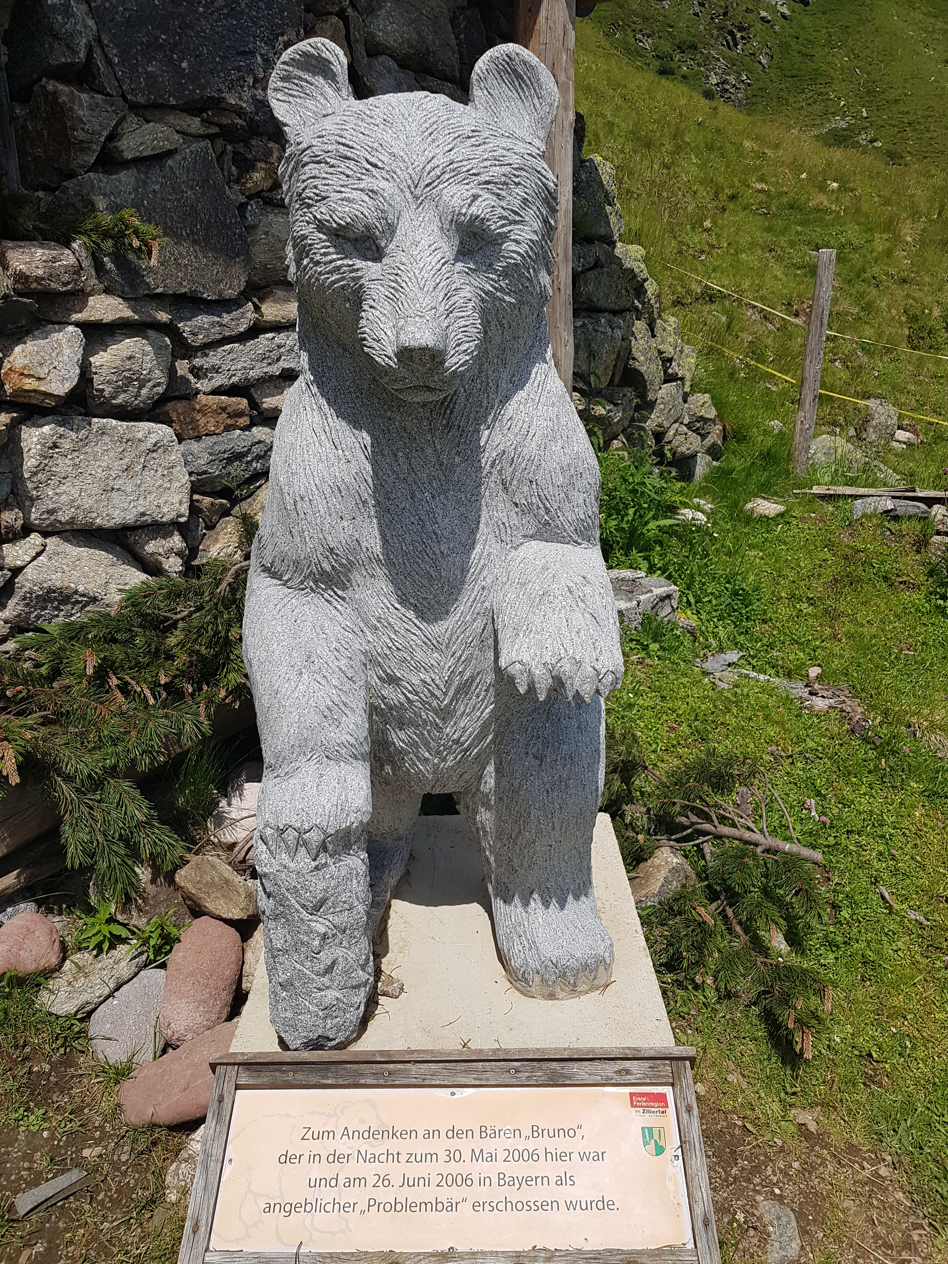 Gedenkstein für den Bären Bruno auf der Gartalm, Zillertal, Tirol, Österreich